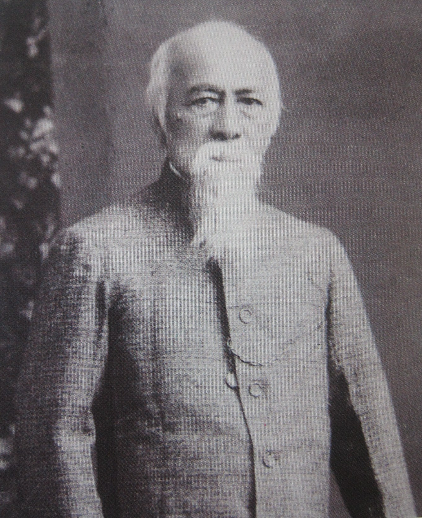 李春生。翻拍自《禮密臣細說台灣民主國》（957-638-605-5；2003-01-12出版）xvi頁。